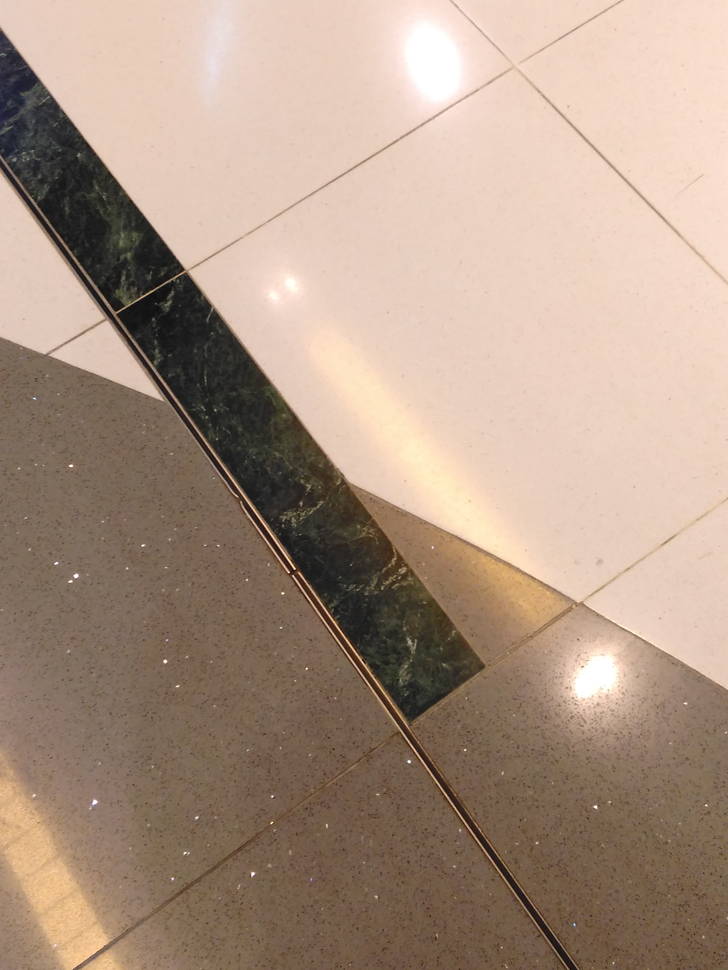 南豐廣場特色雲石地板 Nan Fung Plaza Marble feature floor